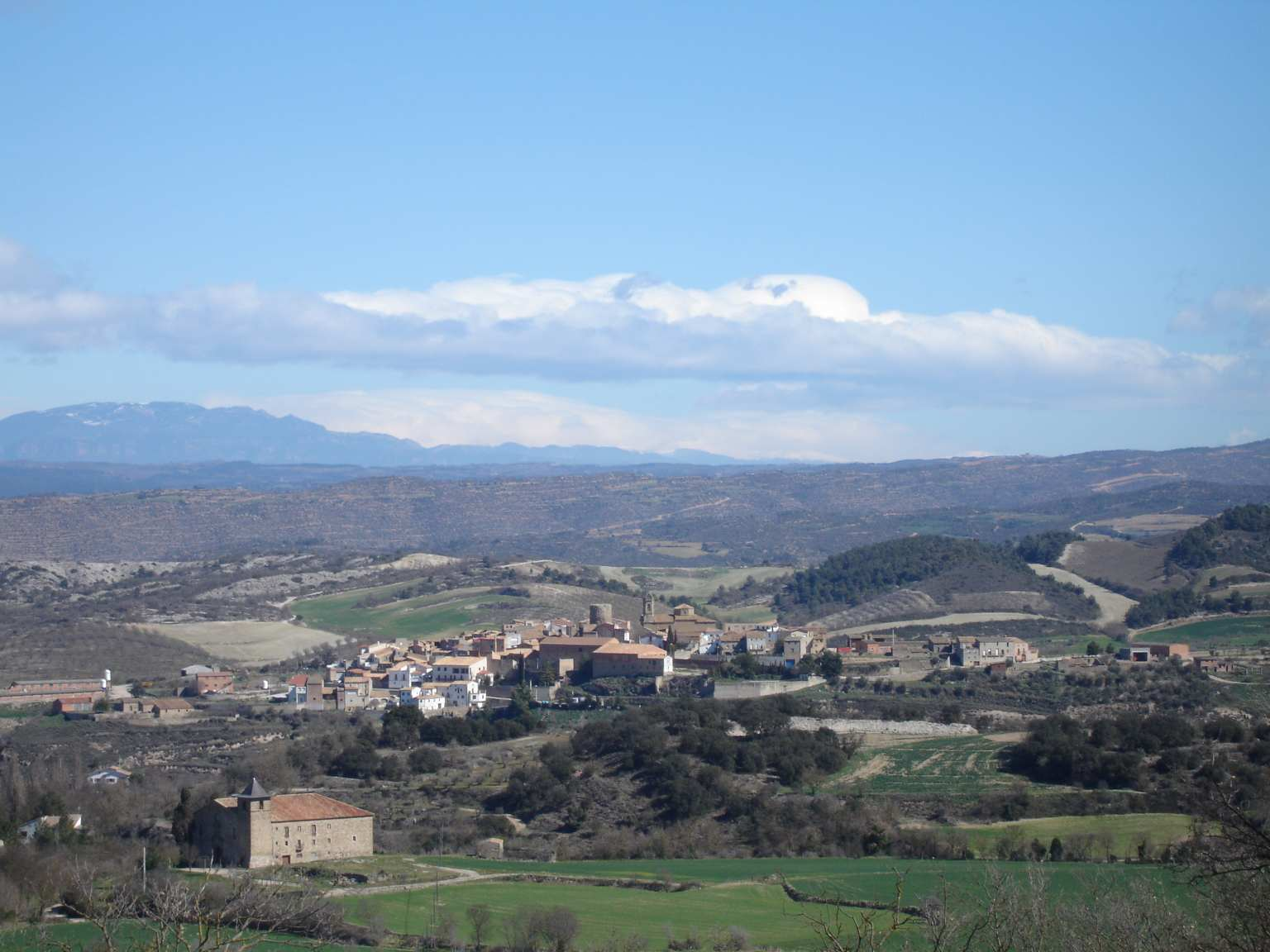 Ivorra (La Segarra, Lleida, Catalunya)